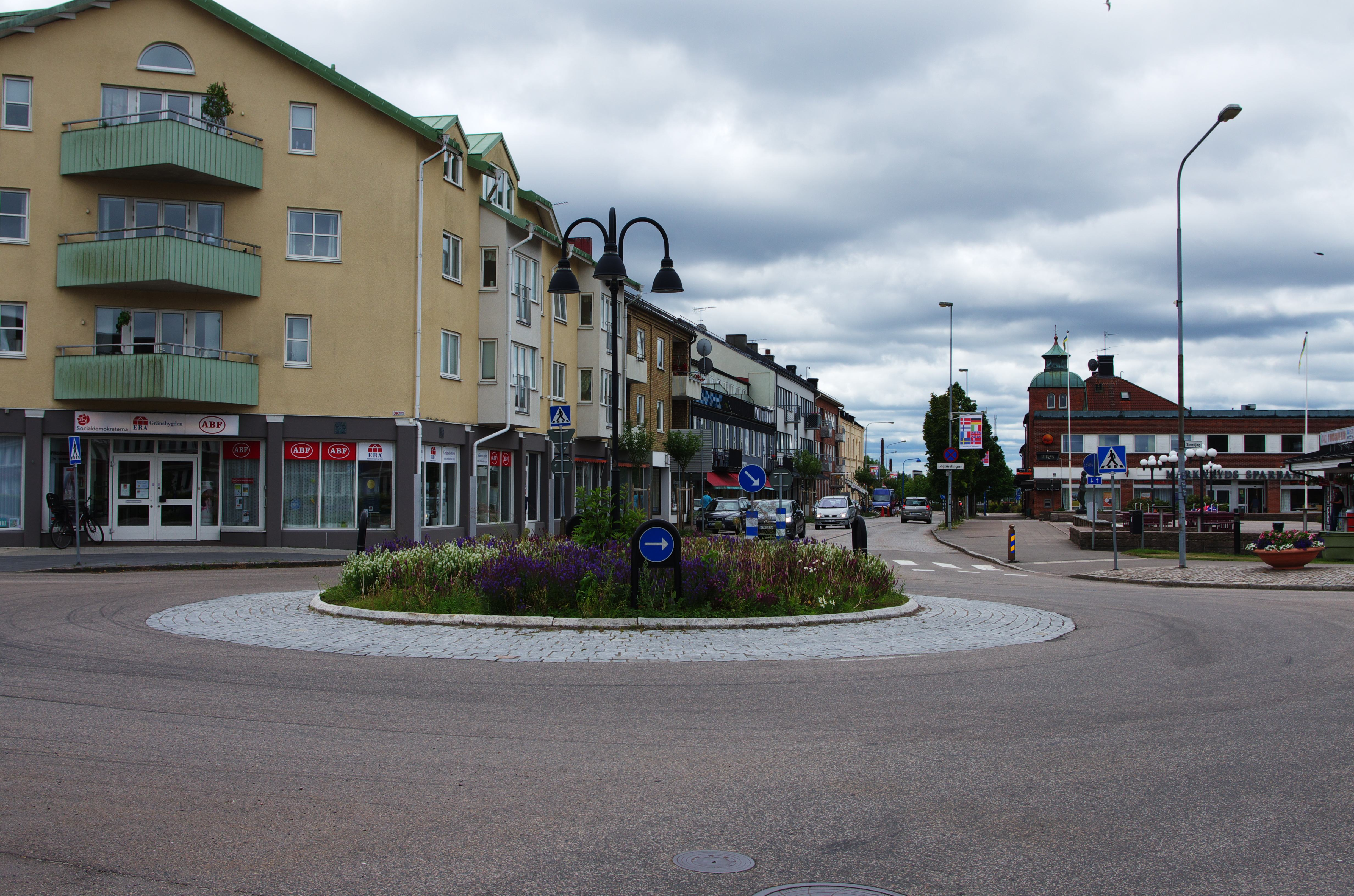 Markaryds centrum.